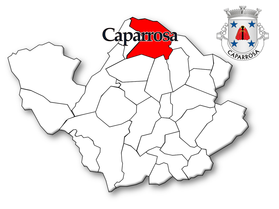 População